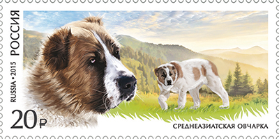 Серия «Фауна России. Служебные породы собак»